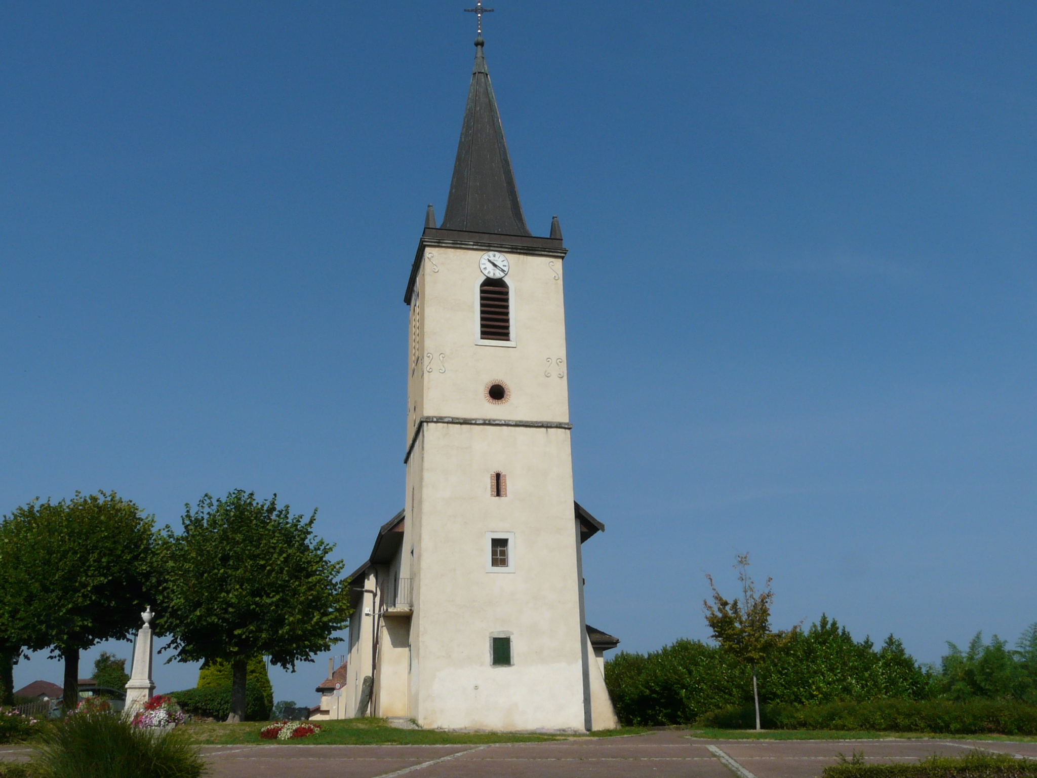 Maxilly-sur-léman : le monument aux morts